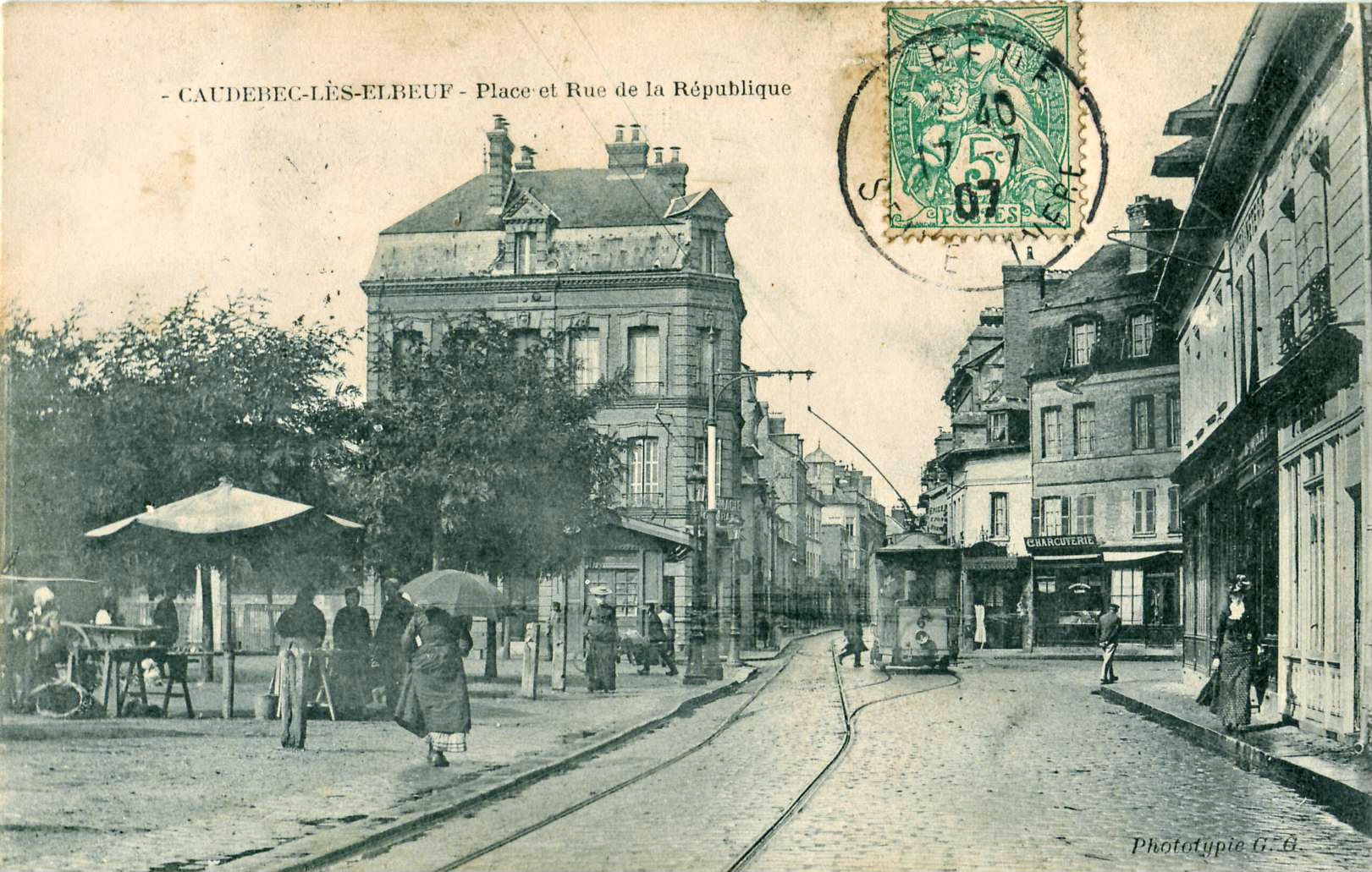 Carte postale ancienne éditée par Phototypie G.G. : CAUDEBEC-LES-ELBEUF tramway d'Elbeuf sur un évitement